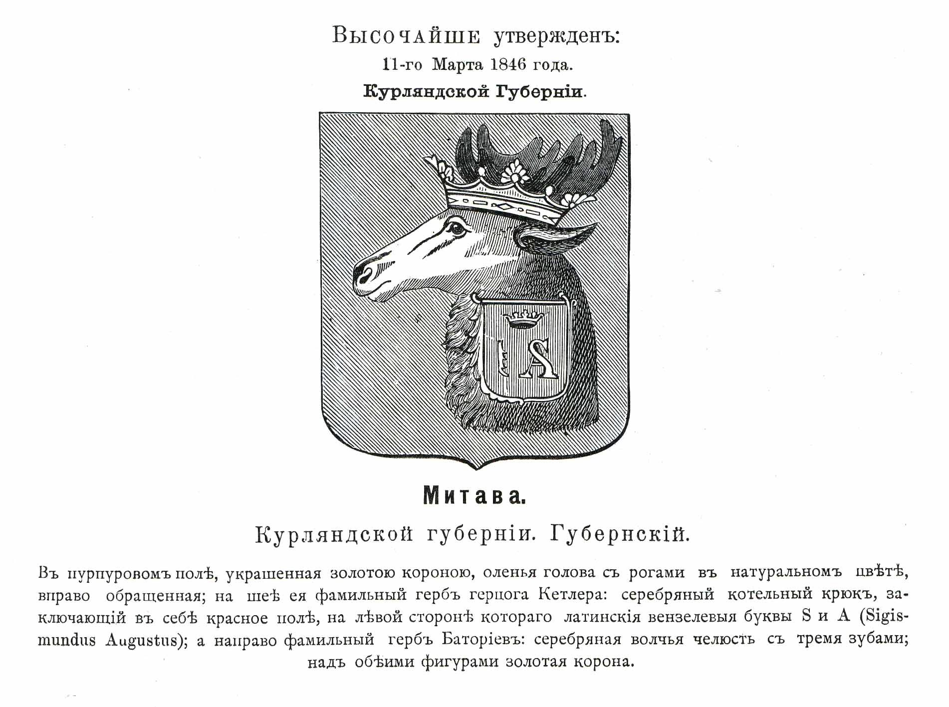 Official Russian Empire coat of arms Митава. Герб Российской Империи губернского города Митава (лат. Елгава) Курляндской губернии с официальным описанием в Гербовнике Винклера.